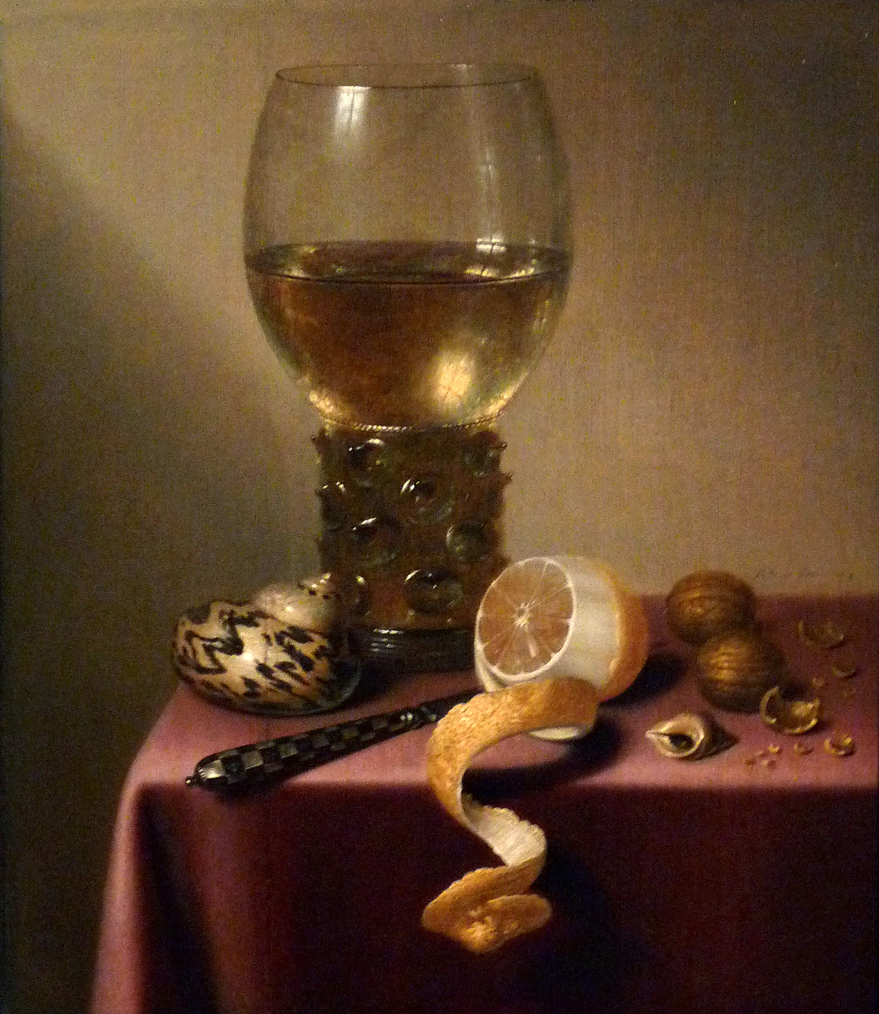 Martin Boelema de Stomme, Nature morte au citron, huile sur bois (Musée des beaux-arts de Reims)